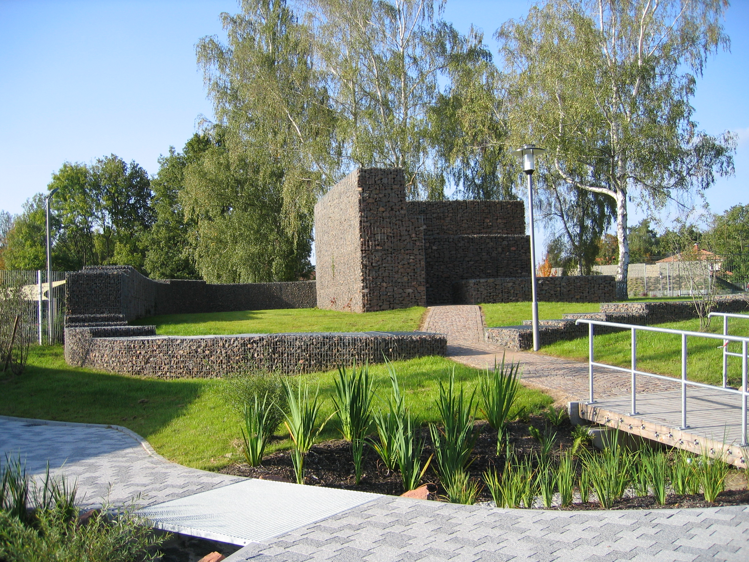 Die "Dieburg" (rekonstruiert) beim Schwimmbad Alsenborn, wahrscheinlich von Barbarossas Vater errichtete einfache Tiefburg, "Motte". Aufgelassen um die Wende vom 12. zum 13. Jahrhundert.